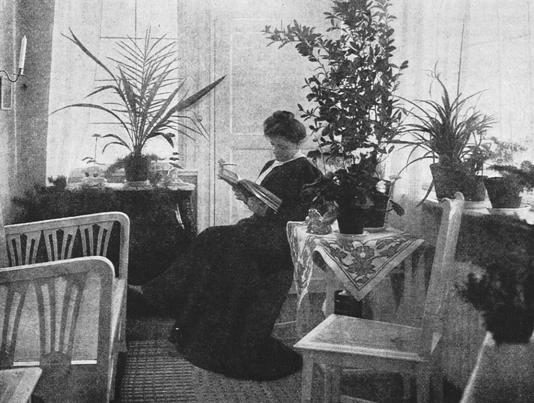 Villa Gärdsgården (FRU GÄRDA WALLANDER VID SITT BLOMSTERFÖNSTER), Sturevägen 37, arkitekt Ragnar Östberg, byggherre Alf Wallander